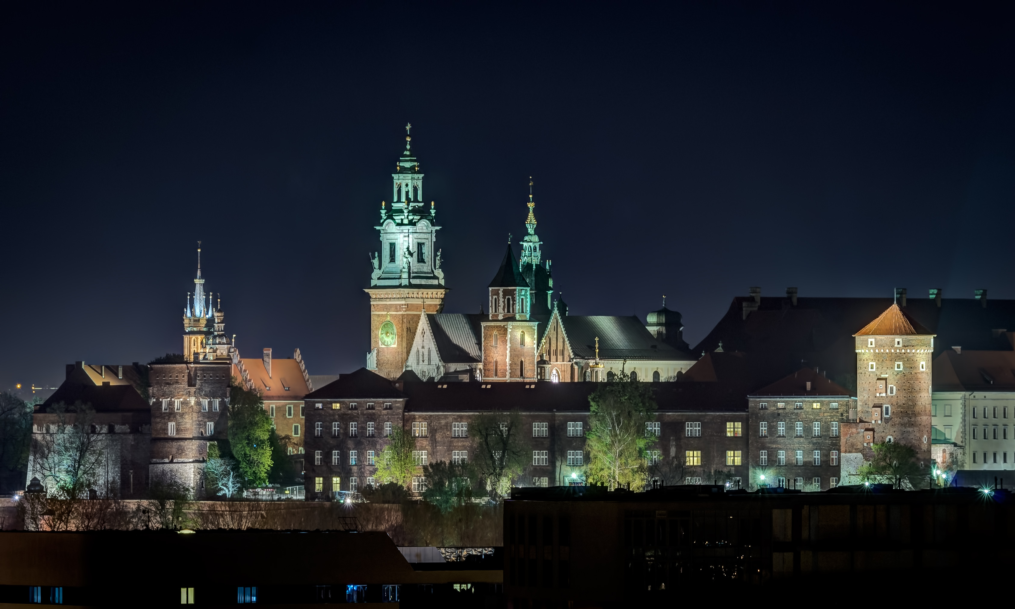 Kraków, zespół Wzgórza Wawelskiego - nocny pejzaż